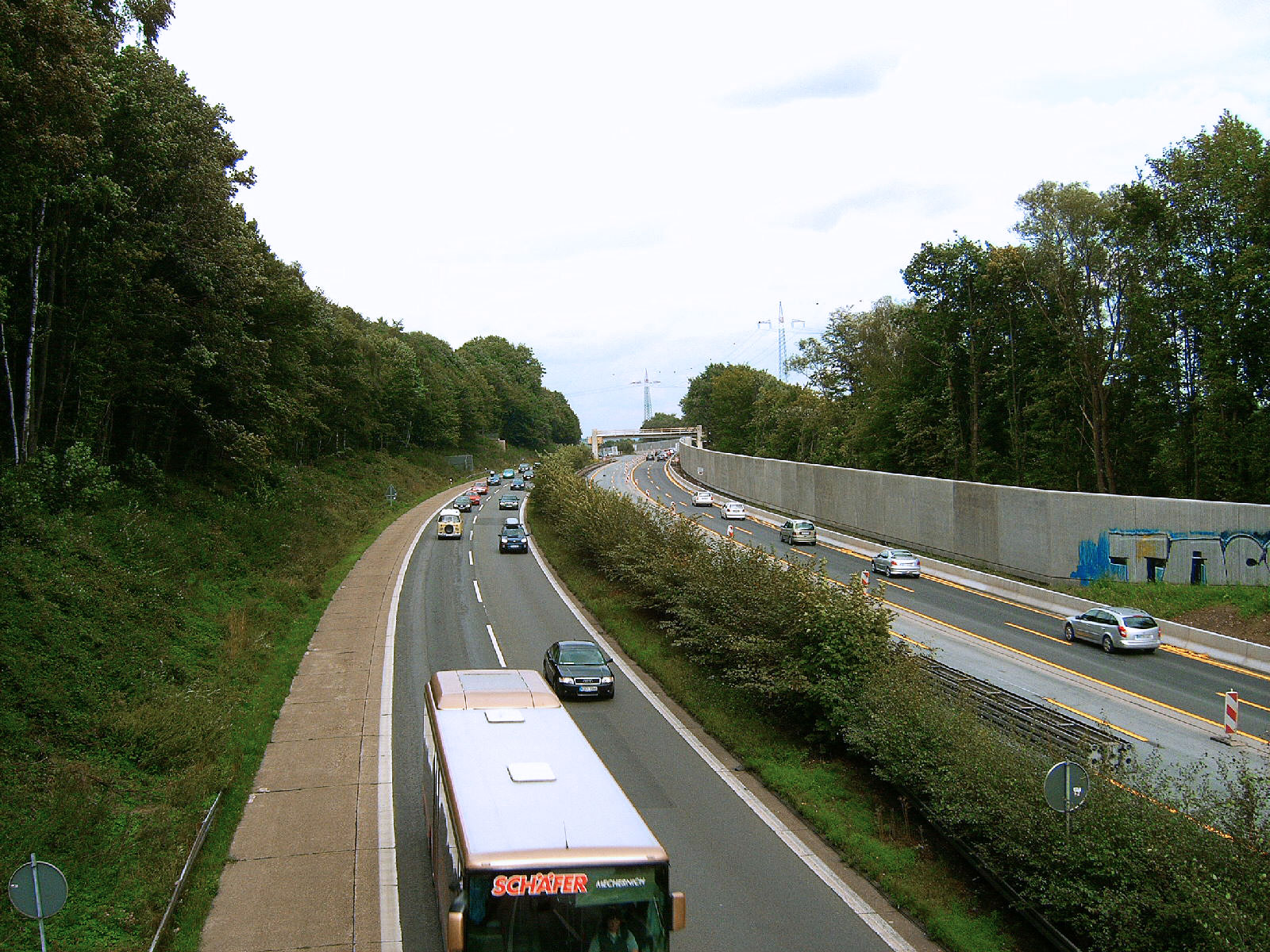 Trasse der A1 kurz vor dem Westhofener Kreuz, während der Umbauphase im August 2006